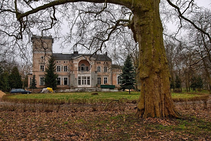 Modrze Dwór Baarthów